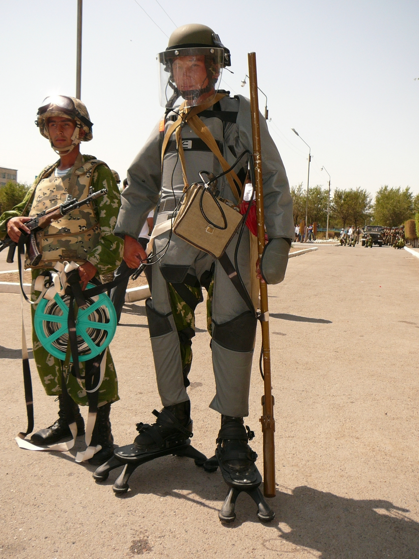 Бойцы Инженерно-Сапёрной Роты 35-й Десантно-Штурмовой Бригады Аэромобильных Войск ВС РК